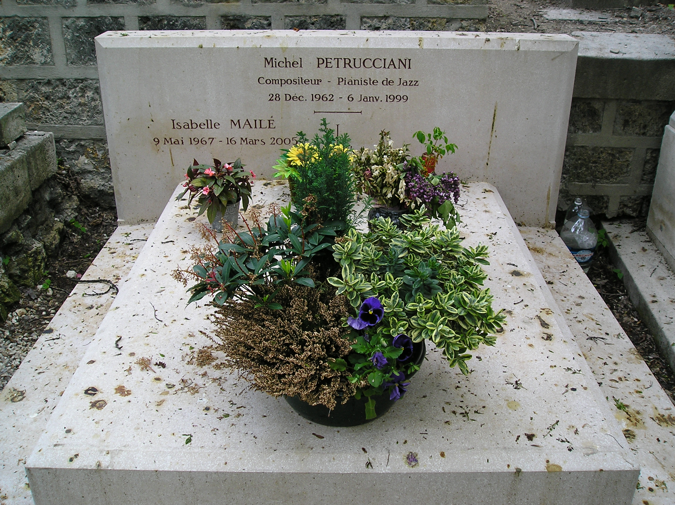 Tombe du pianniste de jazz Michel Petrucciani et sa dernière compagne, Isabelle Mailé, au cimetière du Père-Lachaise.